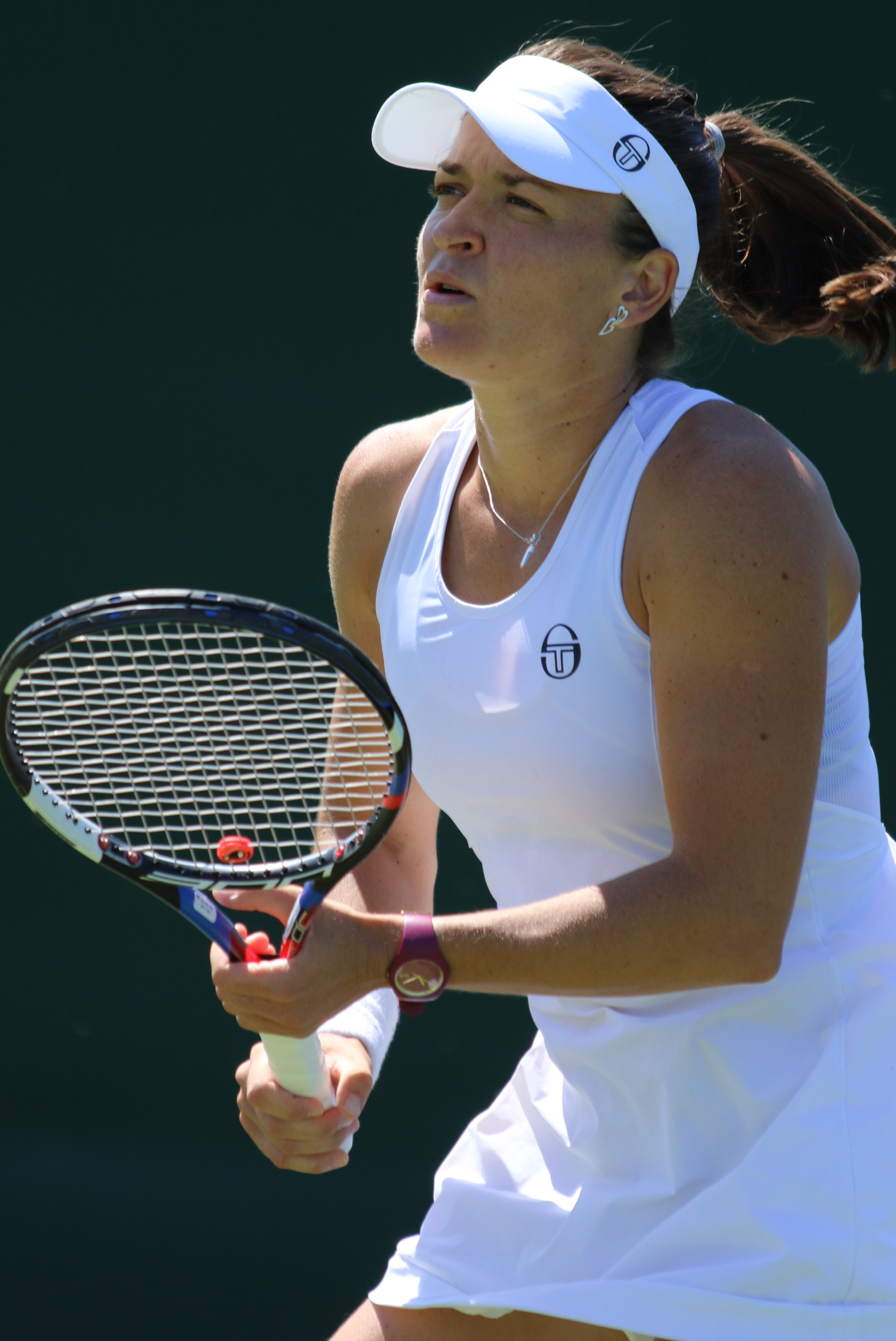 Dulgheru WMQ18 (9)